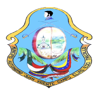 Escudo del municipio Juan Vicente Campo Elías. Estado Trujillo. Venezuela